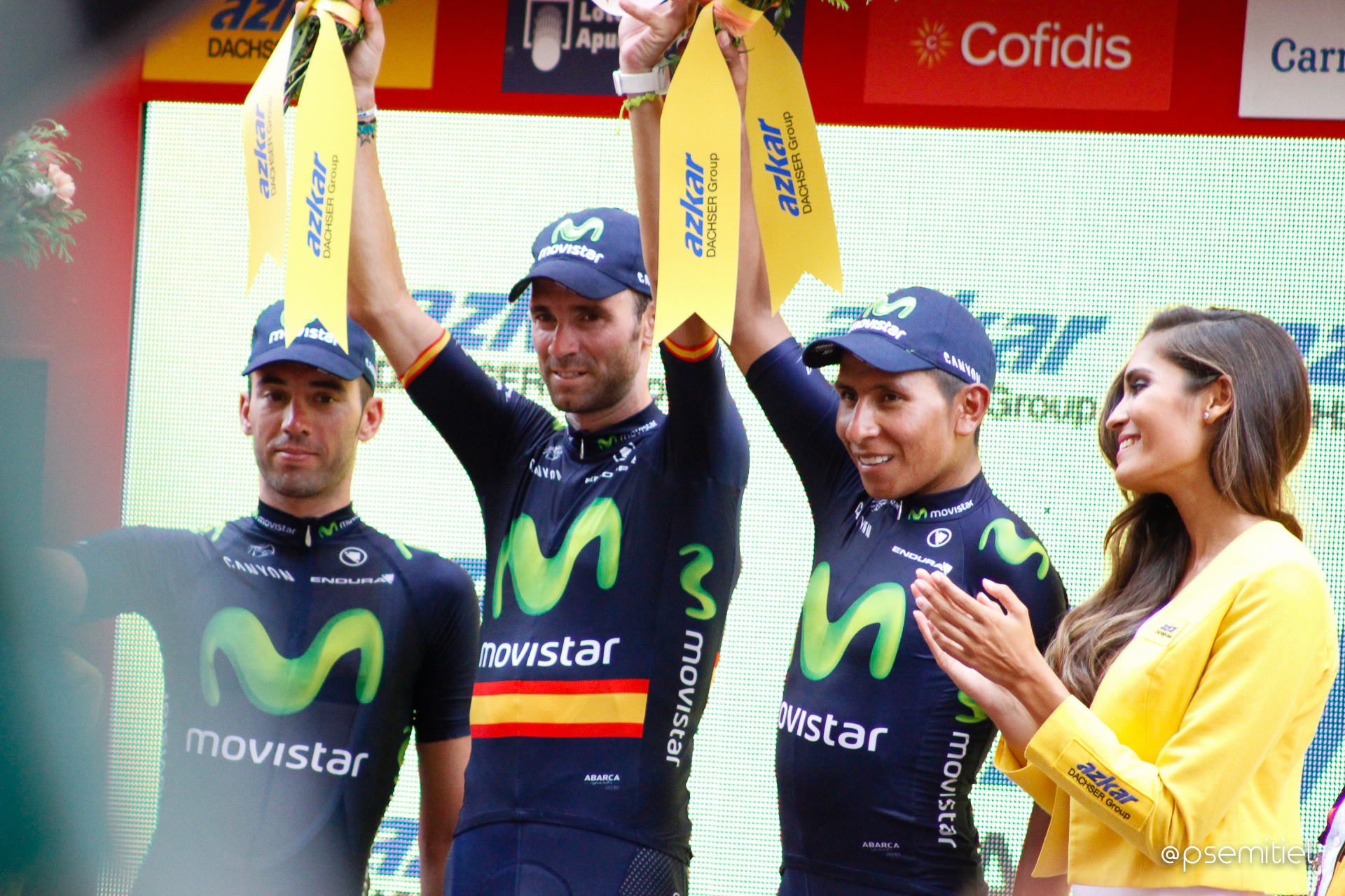 Vuelta a España 2015 | 8ª Etapa Puebla de Don Fadrique - Murcia-99